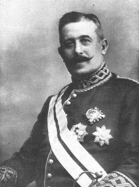 Excmo. Sr. D. Estanislao D'Angelo Muñoz, director general de Obras Públicas, de Kaulak.